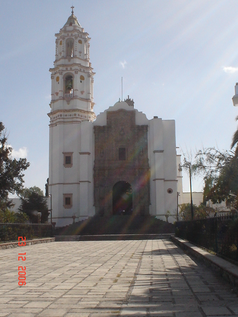 Parroquia Ozumbilla